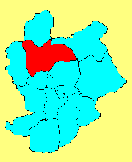 张北县在张家口市的位置；此图片由王云峰wangyunfeng原创，用于WIKI。